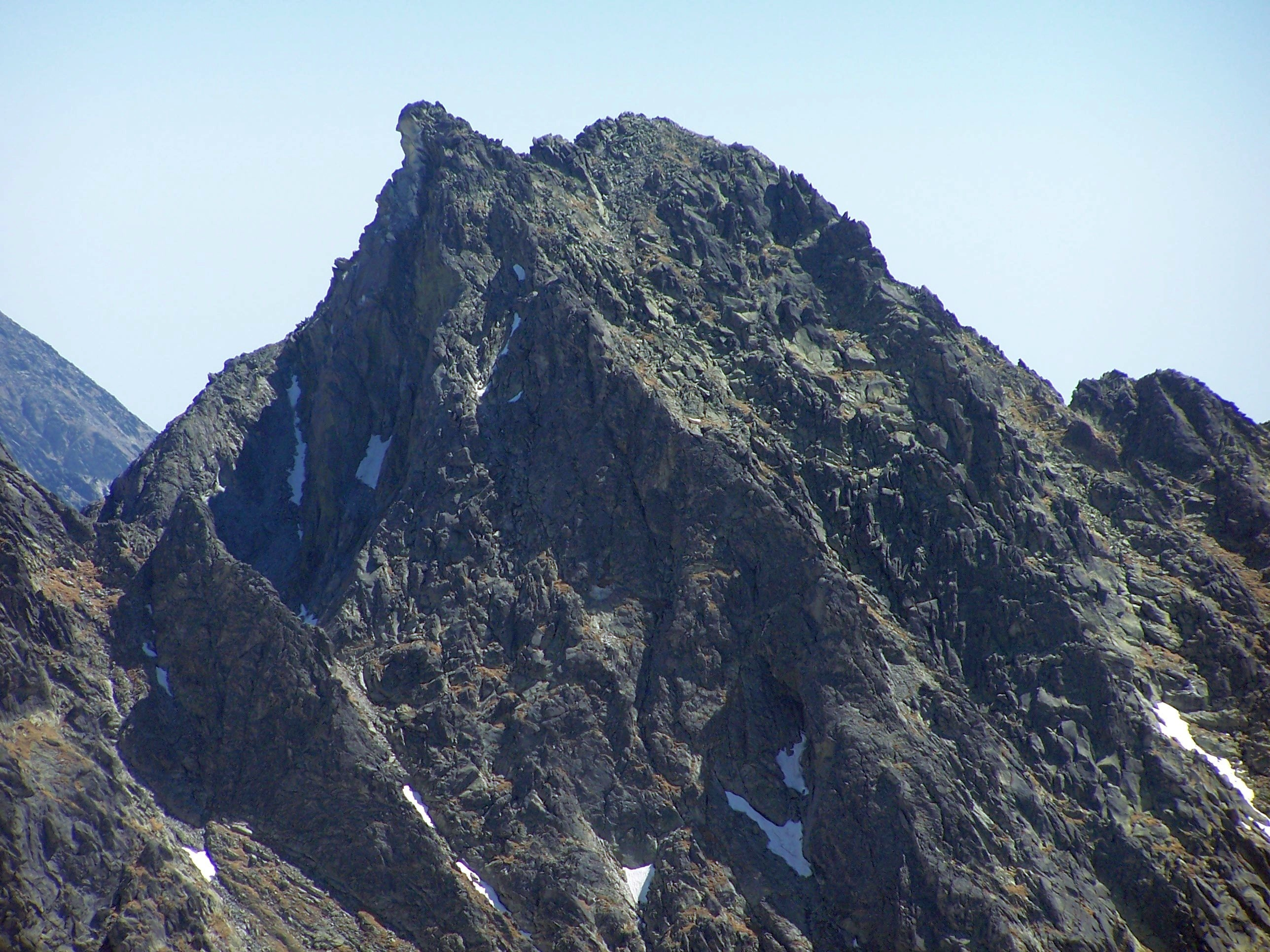 Satan (peak)